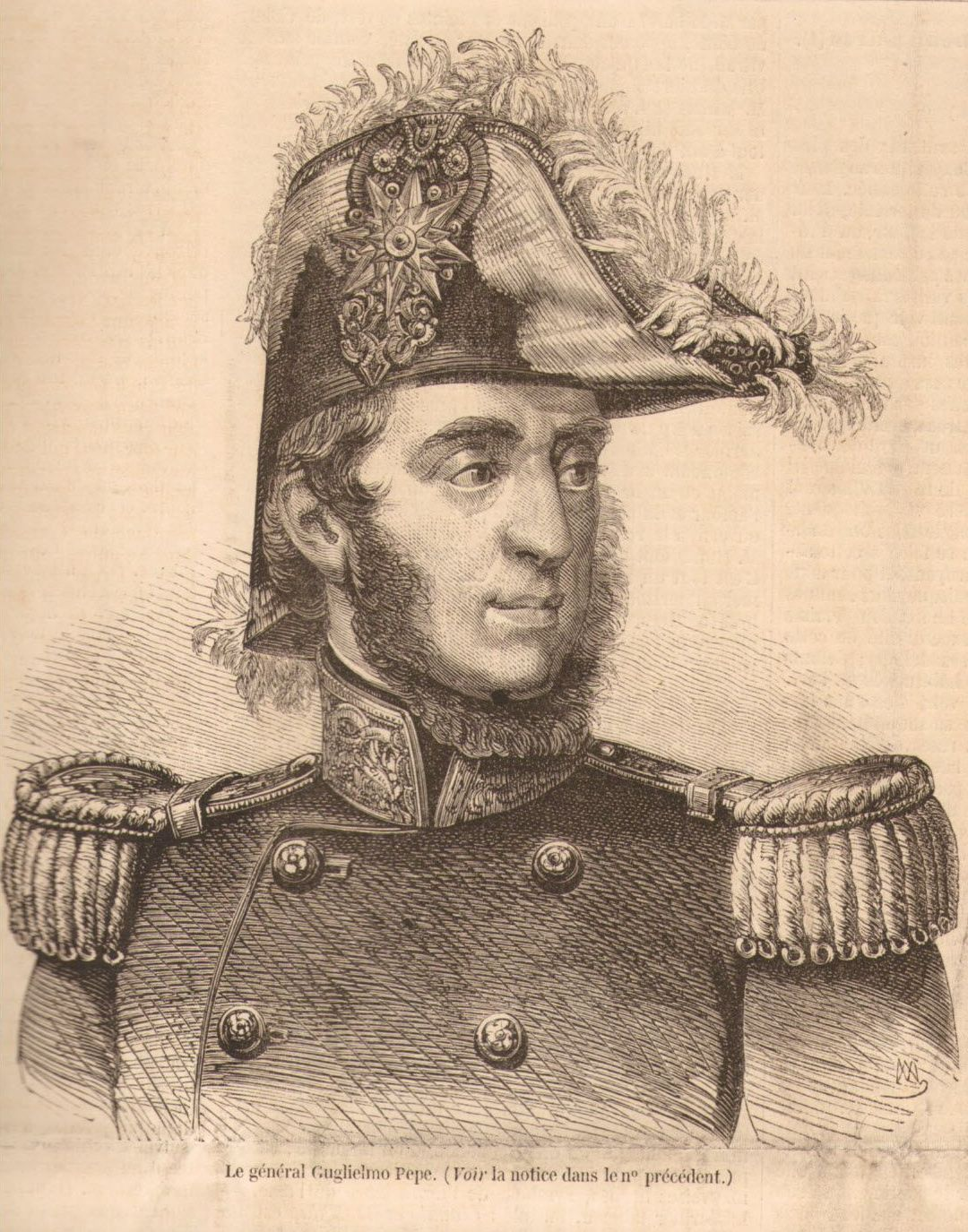 Generale napoletano Guglielmo Pepe (1783-1855)